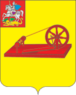 Blason de la ville de Noguinsk en Russie